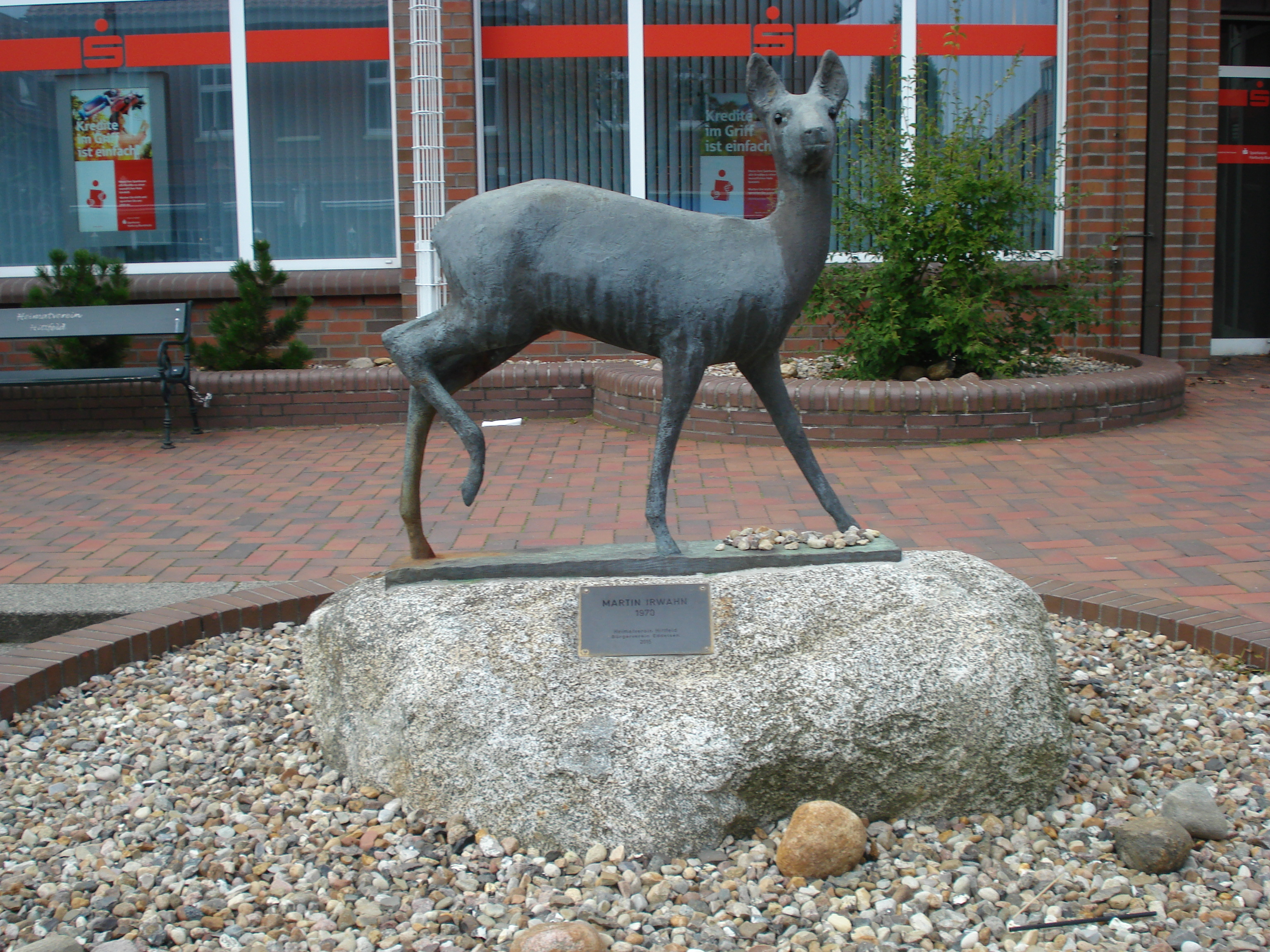 Skulptur "Reh" von Martin Irwahn (1970) in der Kirchstraße in Hittfeld